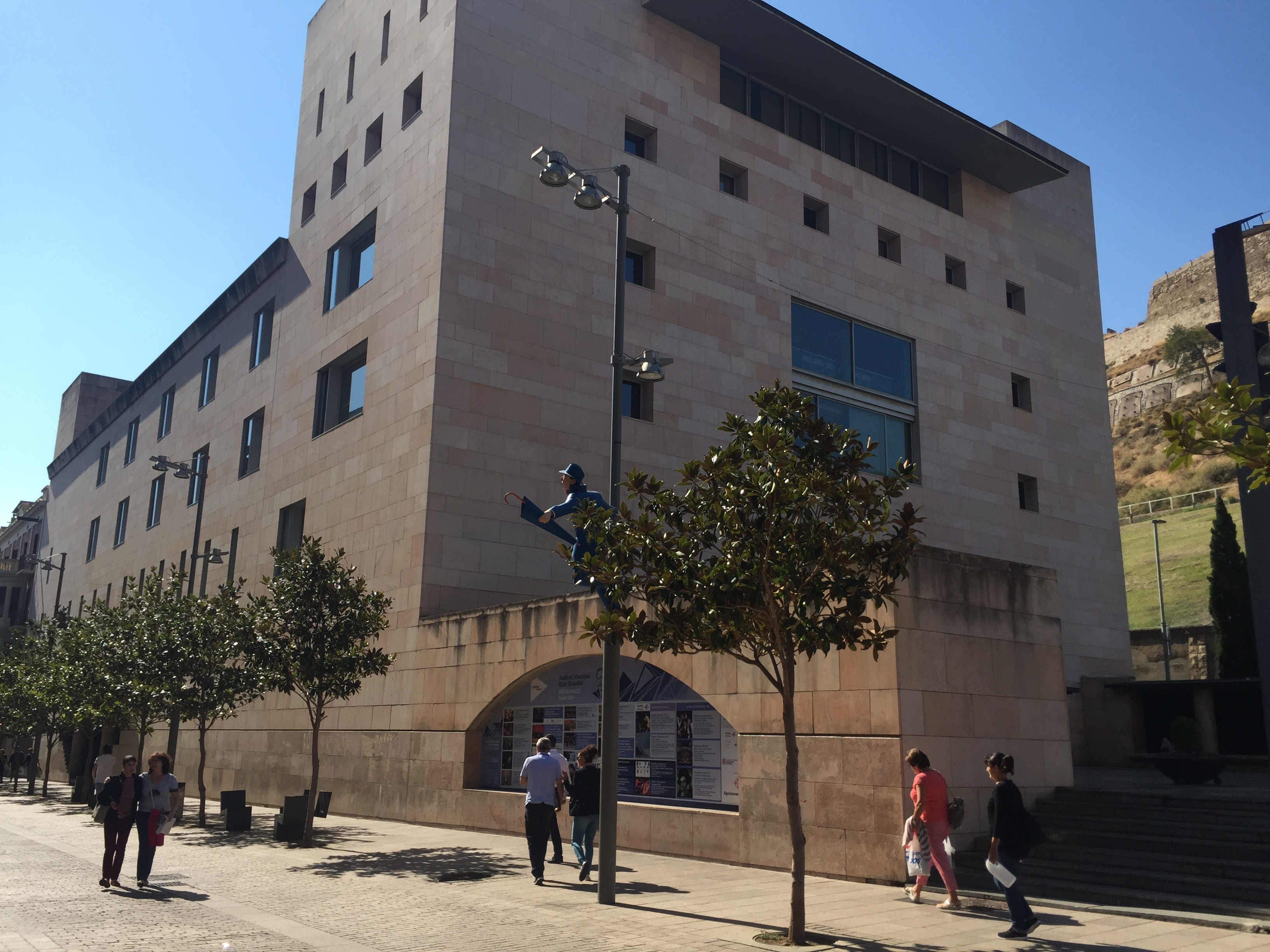 Auditori Municipal Enric Granados (Lleida)